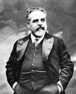 Excmo. Sr. D. Antonio García Alix, obra del fotógrafo Kaulak.